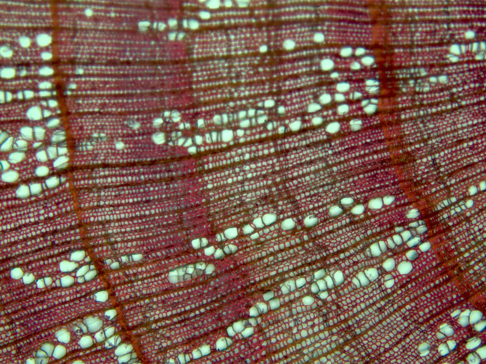 Sarapuu (Corylus avellana) tüve ristlõik - aastarõngad